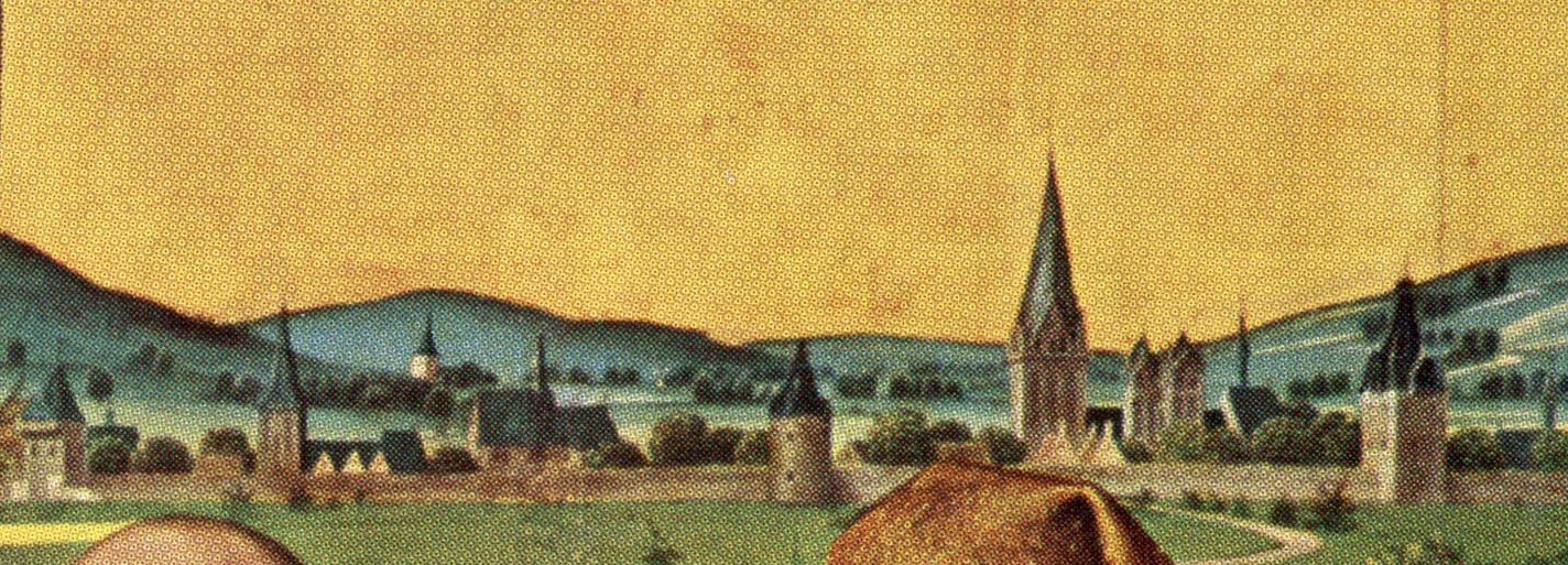 Stadtsilhouette Dortmunds auf dem linken Flügel des Baegert-Retabels in der Dortmunder Propsteikirche (Detailansicht)